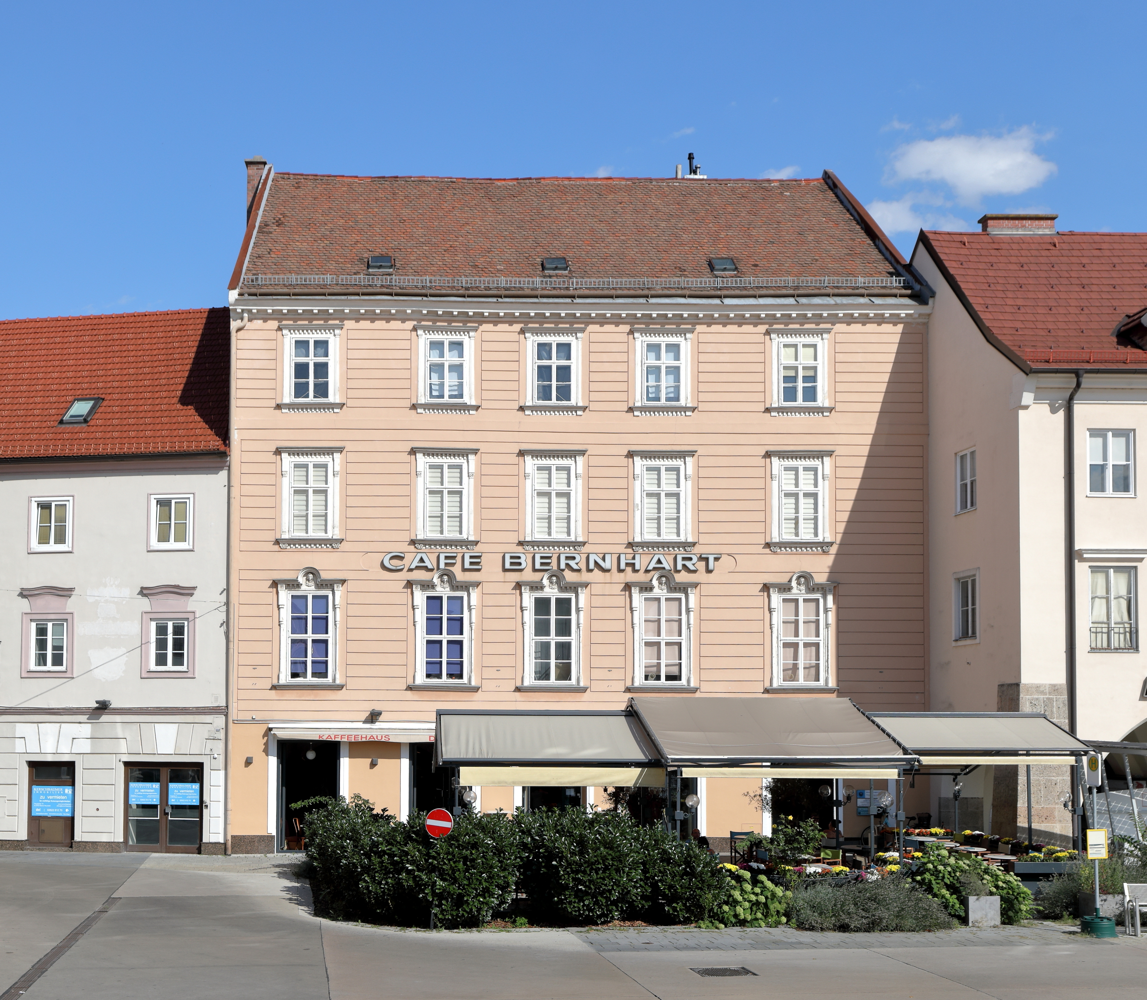 Denkmalgeschütztes Haus an der Adresse „Hauptplatz 20“ in der niederösterreichischen Stadtgemeinde Wiener Neustadt. In ihm befindet sich das Cafe Bernhart.